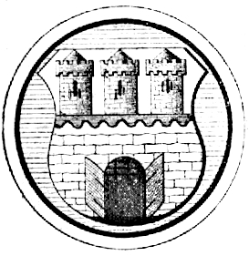 Buda mohácsi vész előtti cimere.